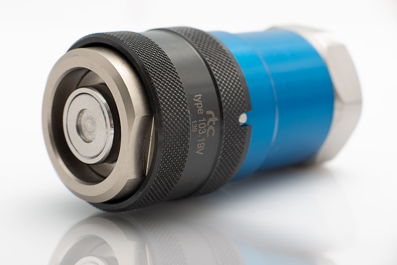 RTC Monocoupling type 103 for hydraulics applications.